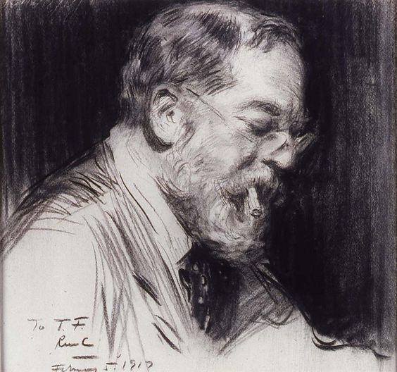 Raymond Moreau Crosby (1874-1945). Portrait of John Singer Sargent,, 1917, charcoal and graphite on laid paper, 18 3/8 x 19 1/4", Addison Gallery of American Art.